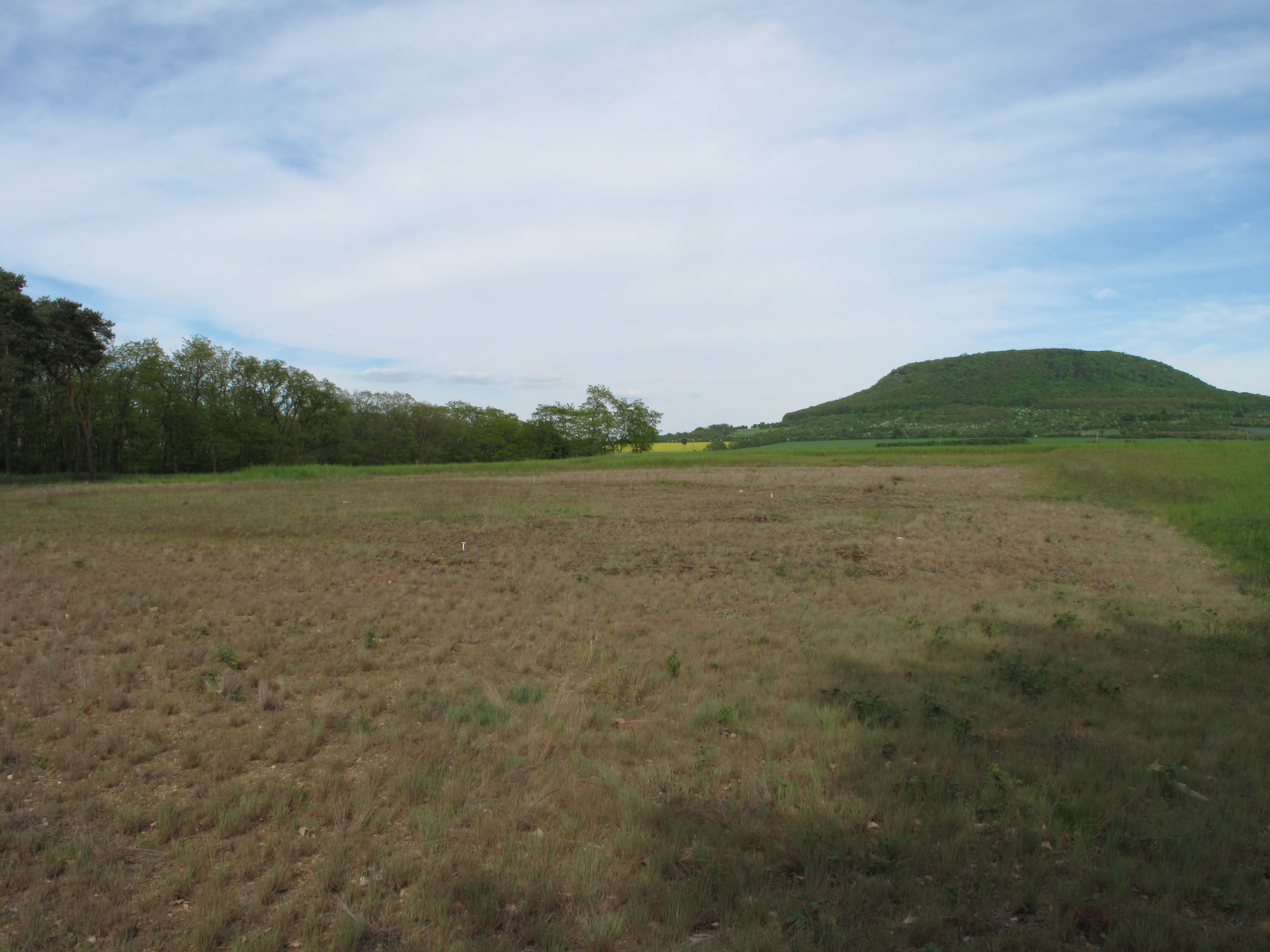 Národní přírodní památka Kleneč. Okres Litoměřice, Česká republika.